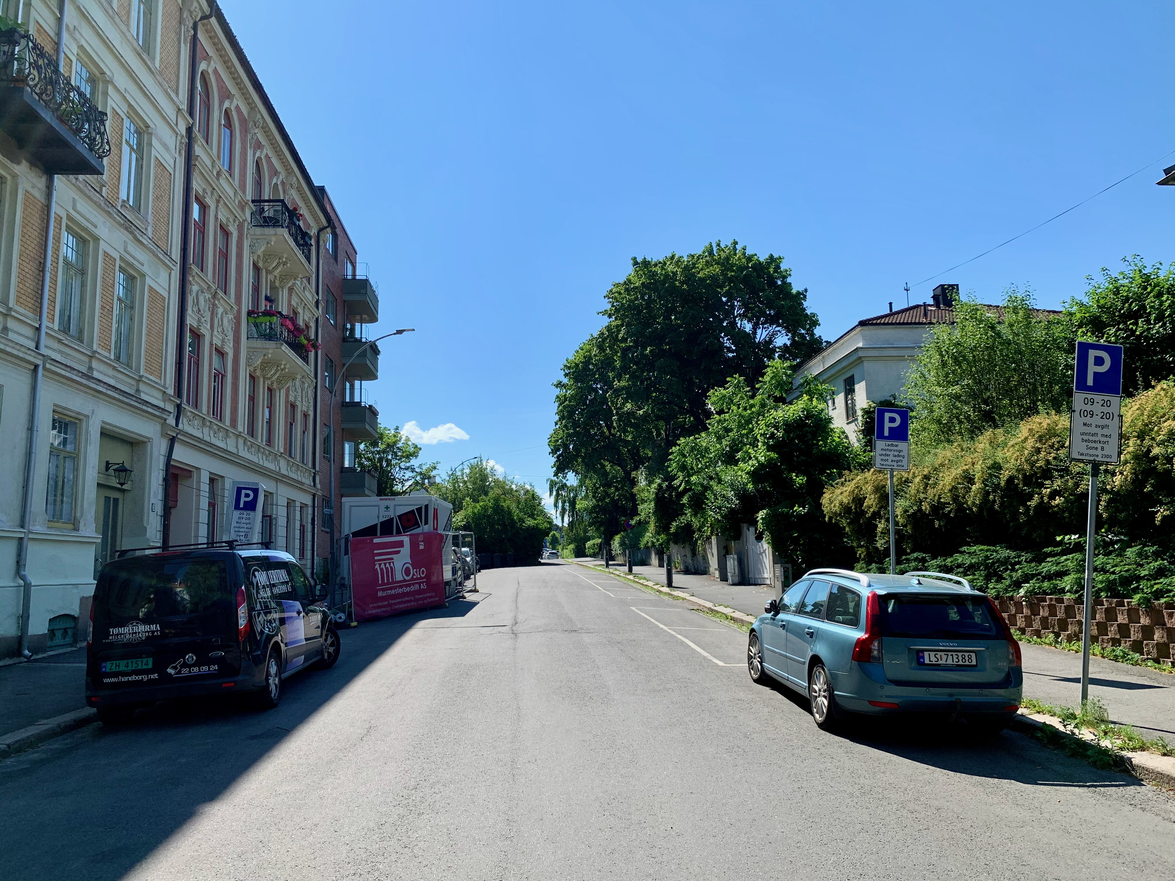 Von der Lippes gate i Oslo.